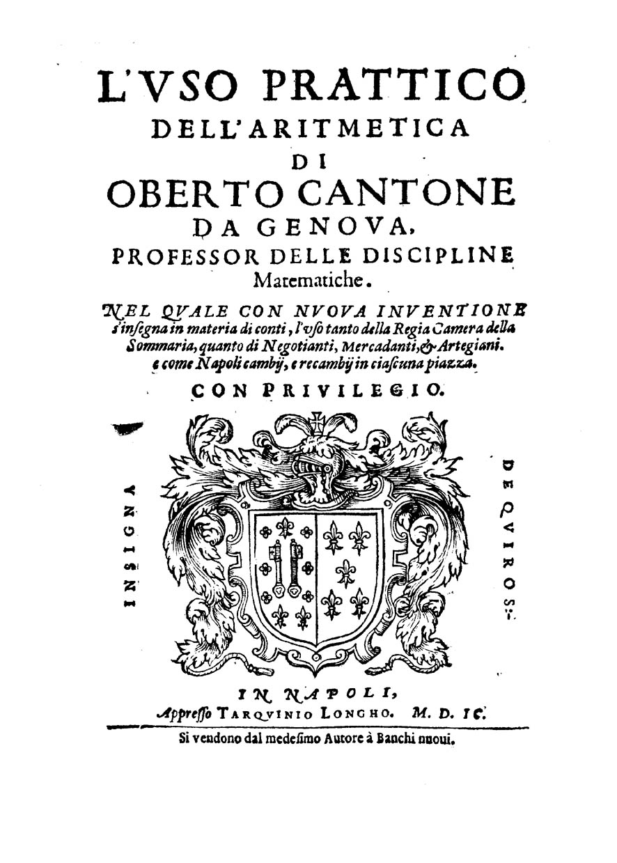 L'vso prattico dell'aritmetica di Oberto Cantone … Nel quale con nuoua inuentione s'insegna in materia di conti, l'vso tanto della Regia Camera della Sommaria, quanto di negotianti, mercadanti, & artegiani. E come Napoli cambij, e ricambij in ciascuna piazza. - In Napoli : appresso Tarquinio Longho, 1599. - [8], 292 p. ; 4º .